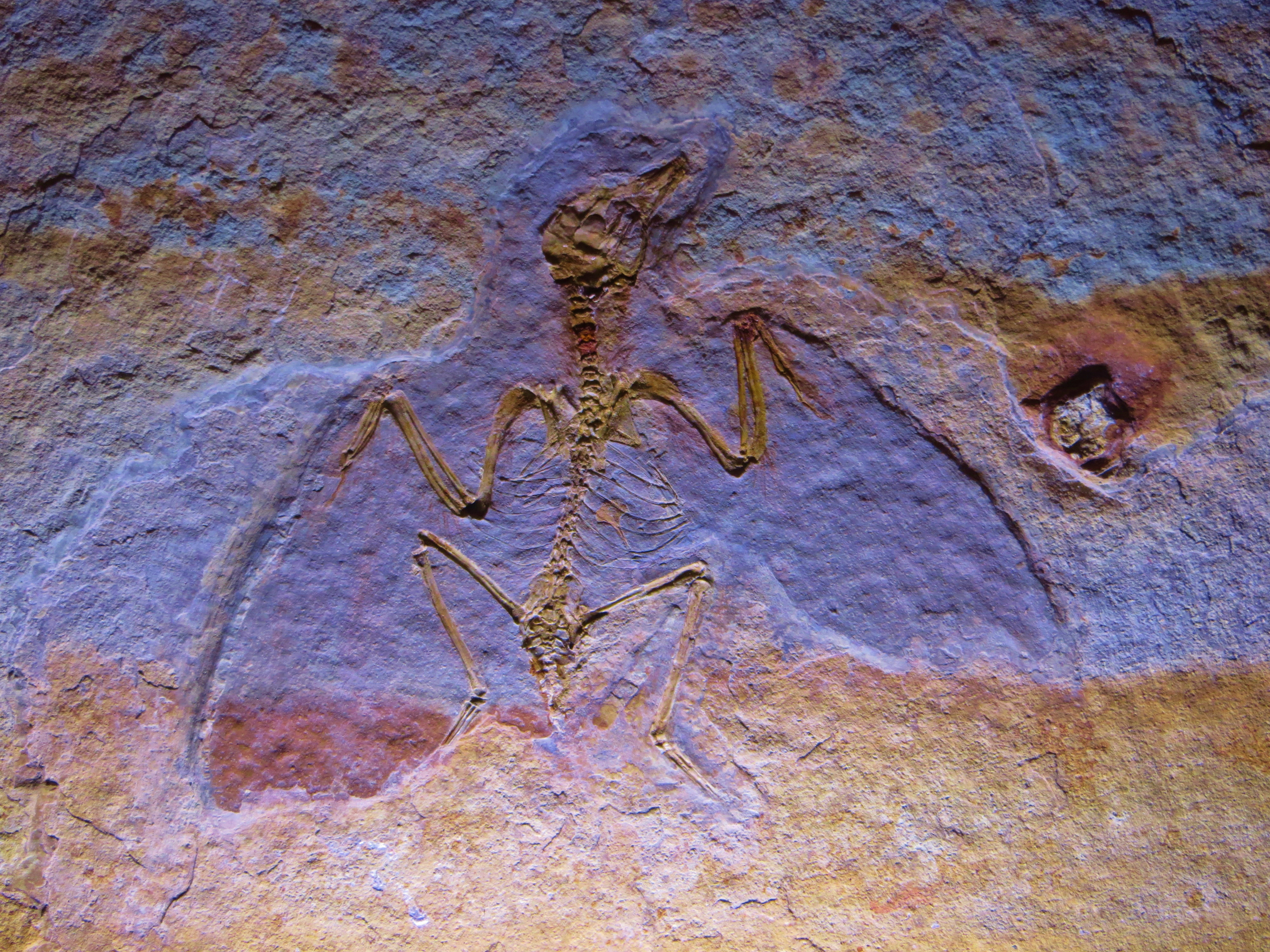 Fossil of Liaoxiornis, an extinct bird- Took the photo at Museo di Storia Naturale di Venezia